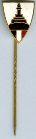 Abzeichen des Kyffhäuserbundes - Zunächst war der KB ziemlich kaisertreu, erst später wurde er von den Nazis vereinnahmt und die Nadel erhielt ein kleines Hakenkreuz (Swastika) als Zusatz